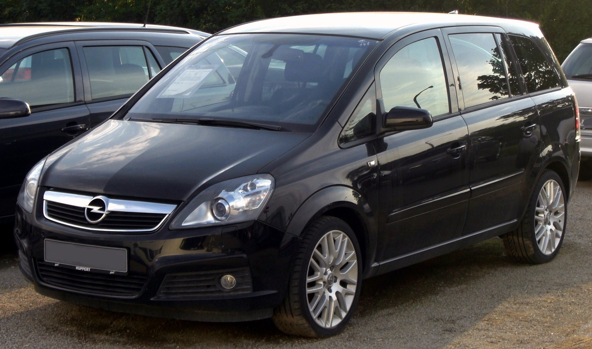 Opel Zafira B